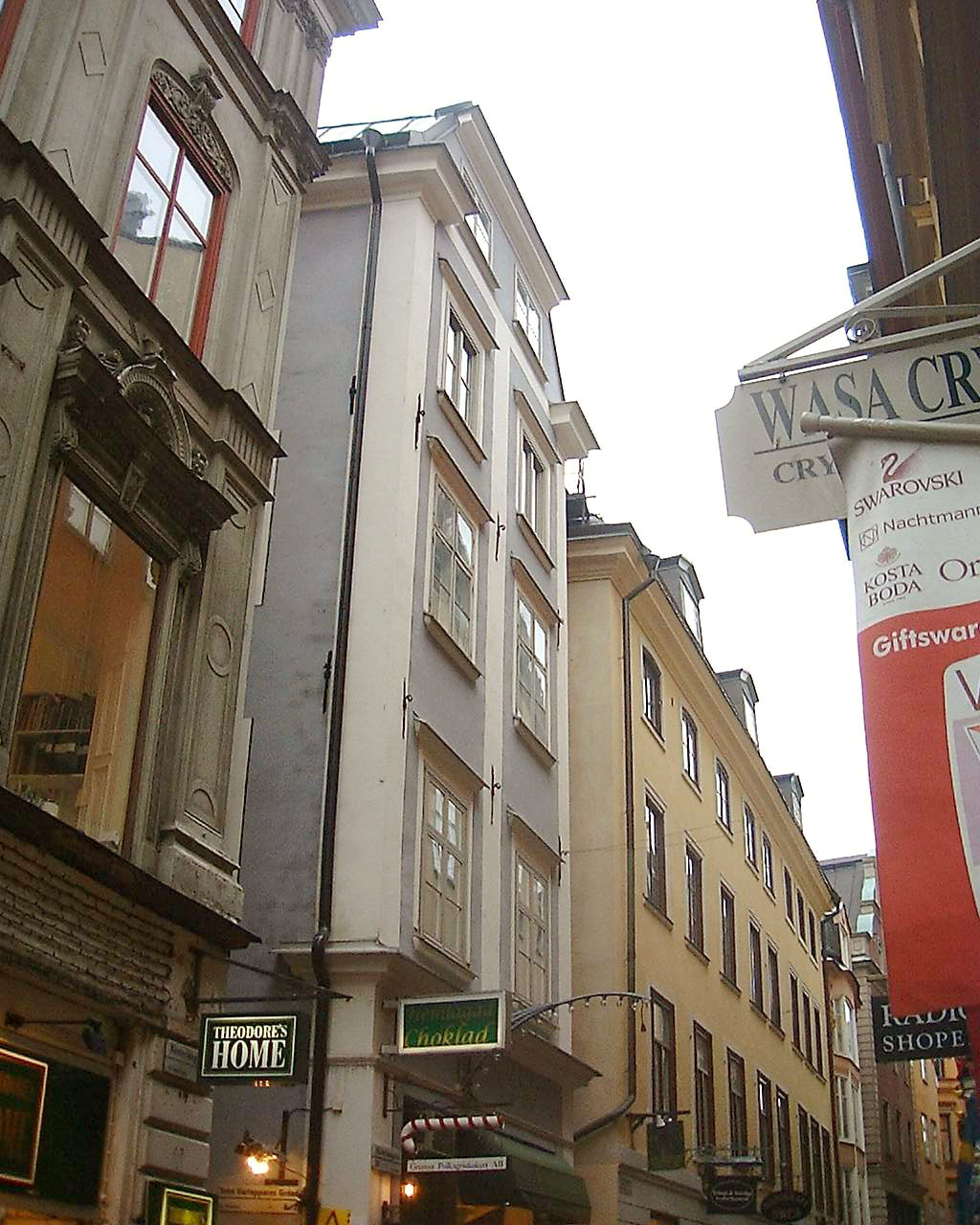 Västerlånggatan, Gamla stan, Stockholm